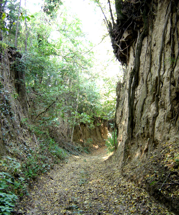 Banska kosa, surduk, Baranja